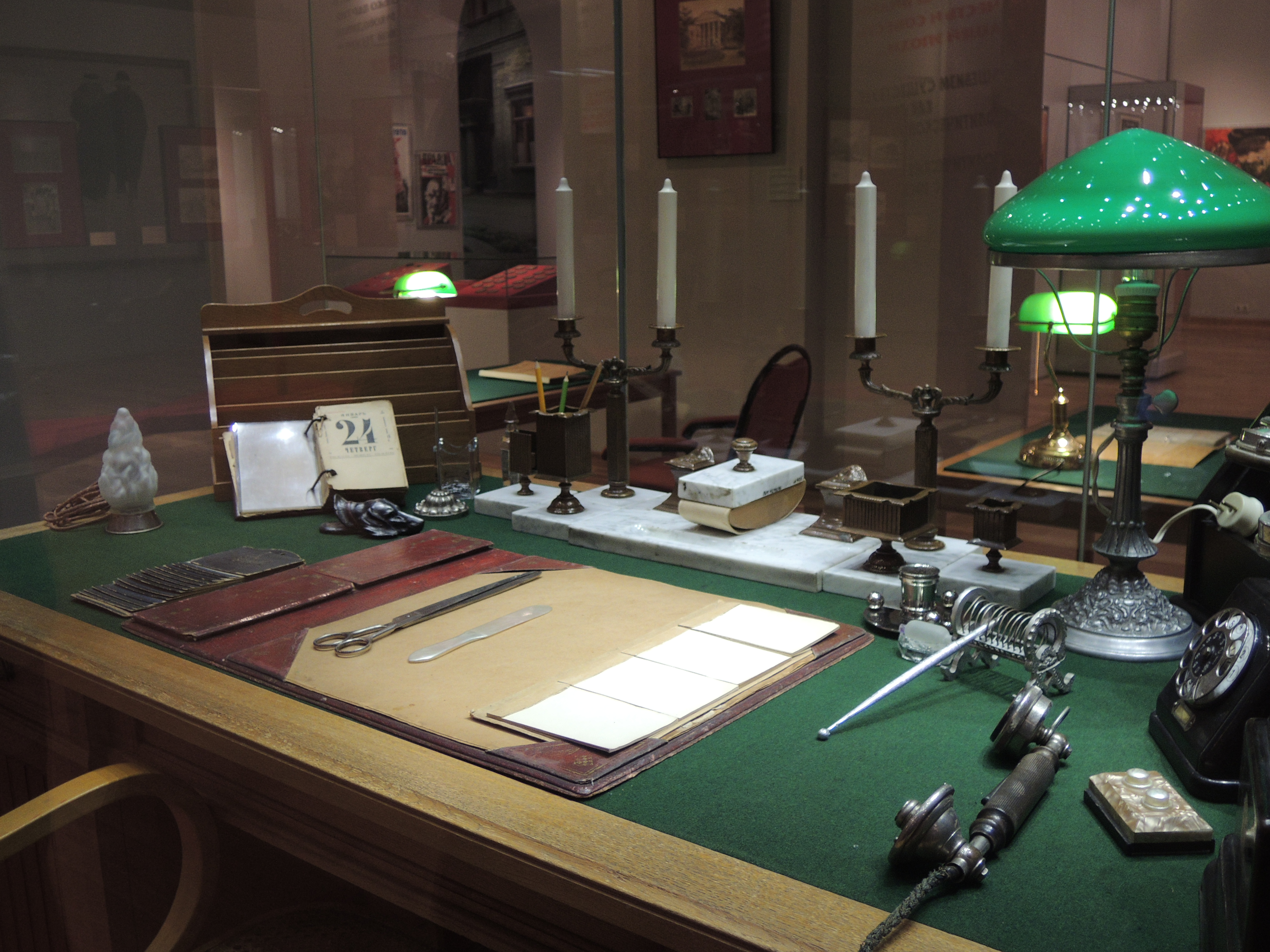 До 1955 года для желающих увидеть место работы вождя экспонировалась копия кабинета в одном из залов музея Института Ленина при ЦК ВКП(б), затем копия была воссоздана к открытию Центрального музея В. И. Ленина в 1936 году